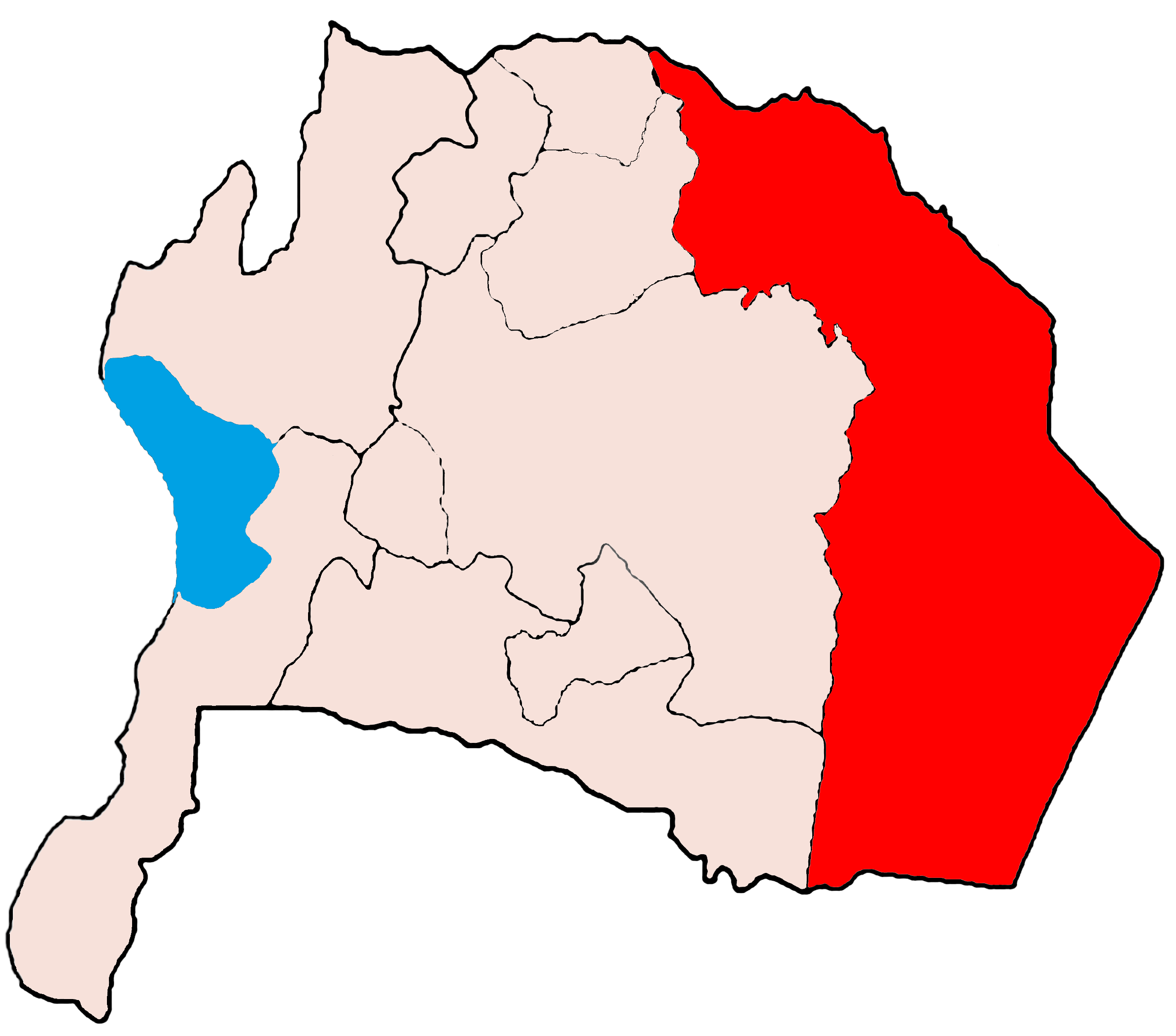 Maps of Karak — Karak-Gotraneh User:Tarawneh/rami